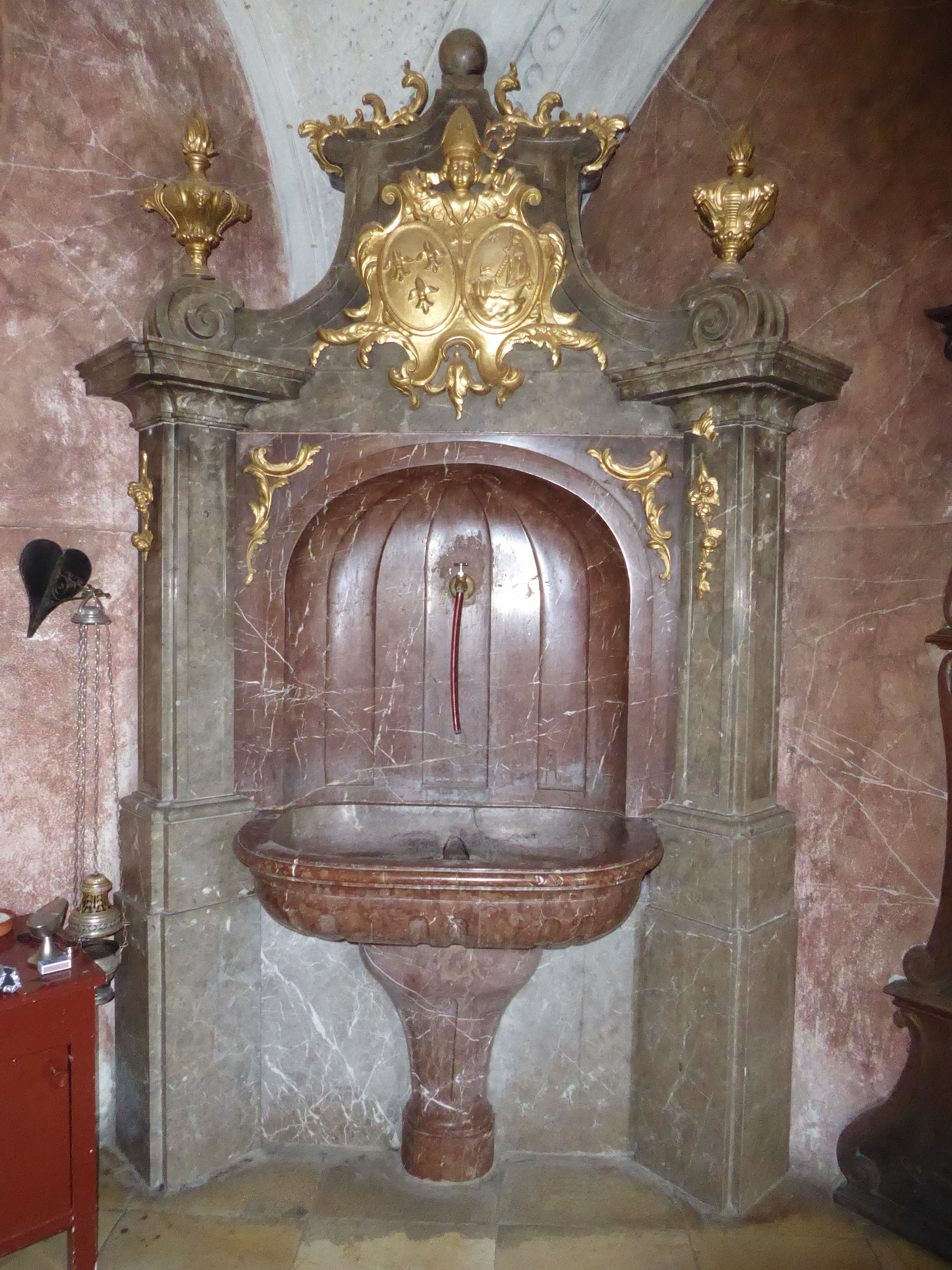 Pfarr- und Wallfahrtskirche Mariae Geburt, Maria Langegg 1, Bergern im Dunkelsteinerwald, Niederösterreich - Lavabo in der Sakristei mit Wappen von Abt Dominik Peckenstorfer, Stift Lilienfeld